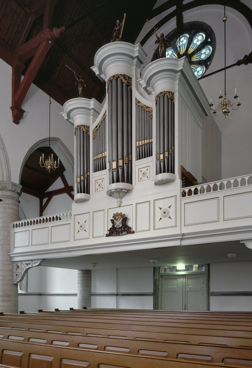 Nederlands Hervormde Kerk: Interieur, aanzicht orgel (opmerking: Gefotografeerd voor Het Historische Orgel in Nederland 1850-1858)